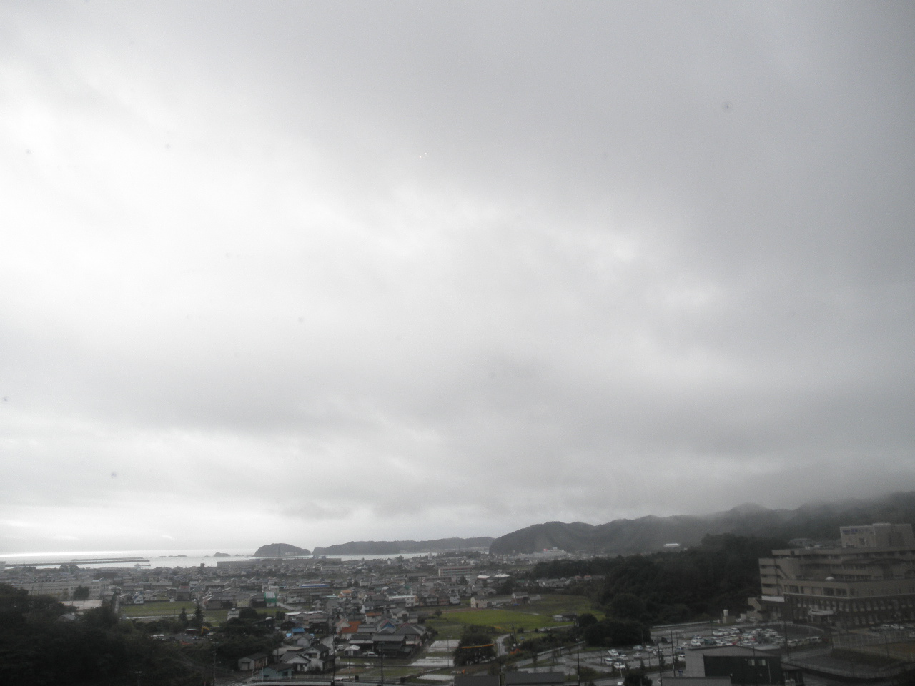 和歌山県新宮市佐野 遠景